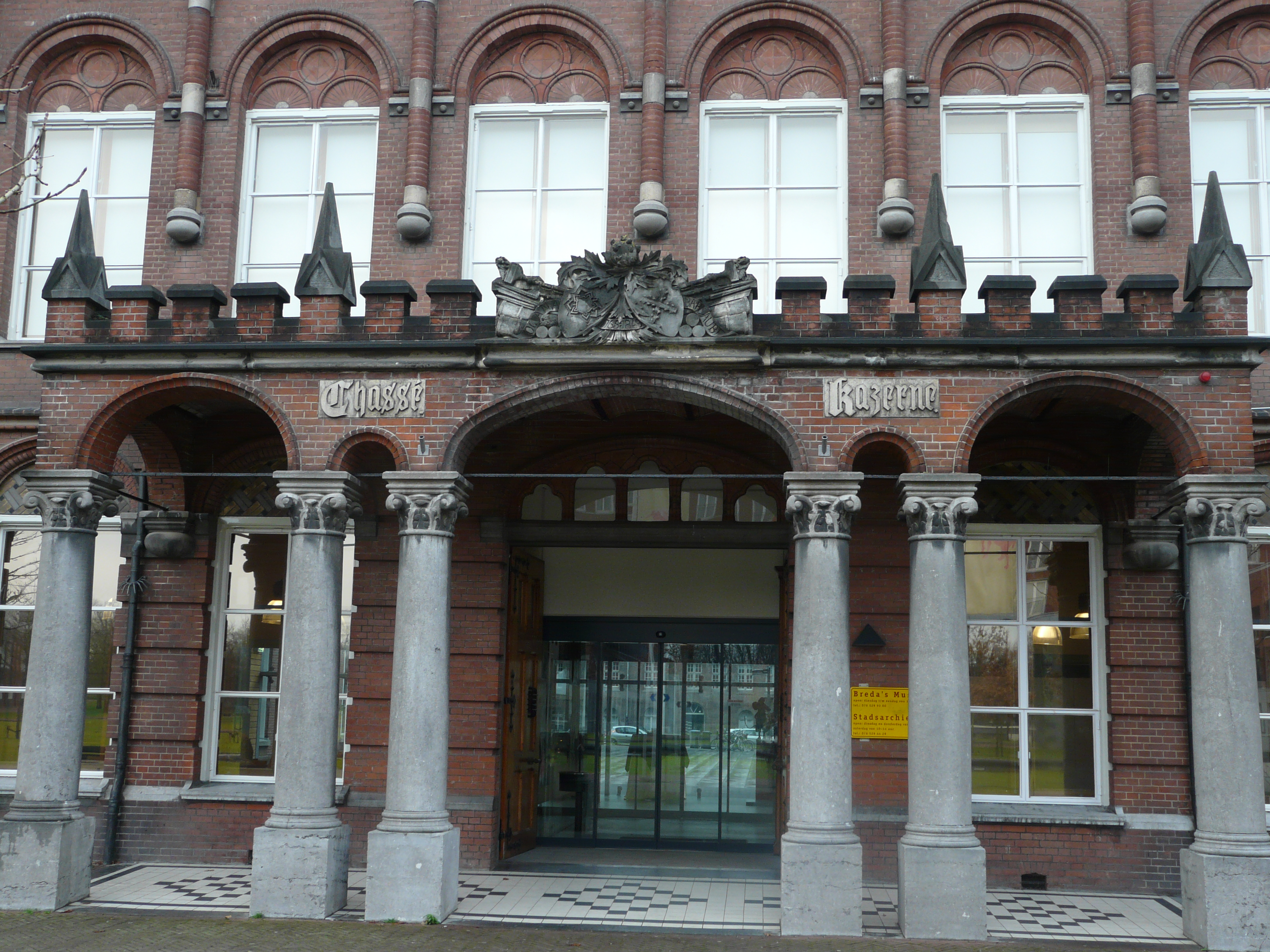 Zicht op een deel van de entree van de voormalige Chassekazerne aan de Parade 12-14 in het centrum van Breda. Tegenwoordig is hier nog het Stadsarchief Breda gevestigd. Voorheen was hier ook het Breda's Museum, later Stedelijk Museum Breda genoemd